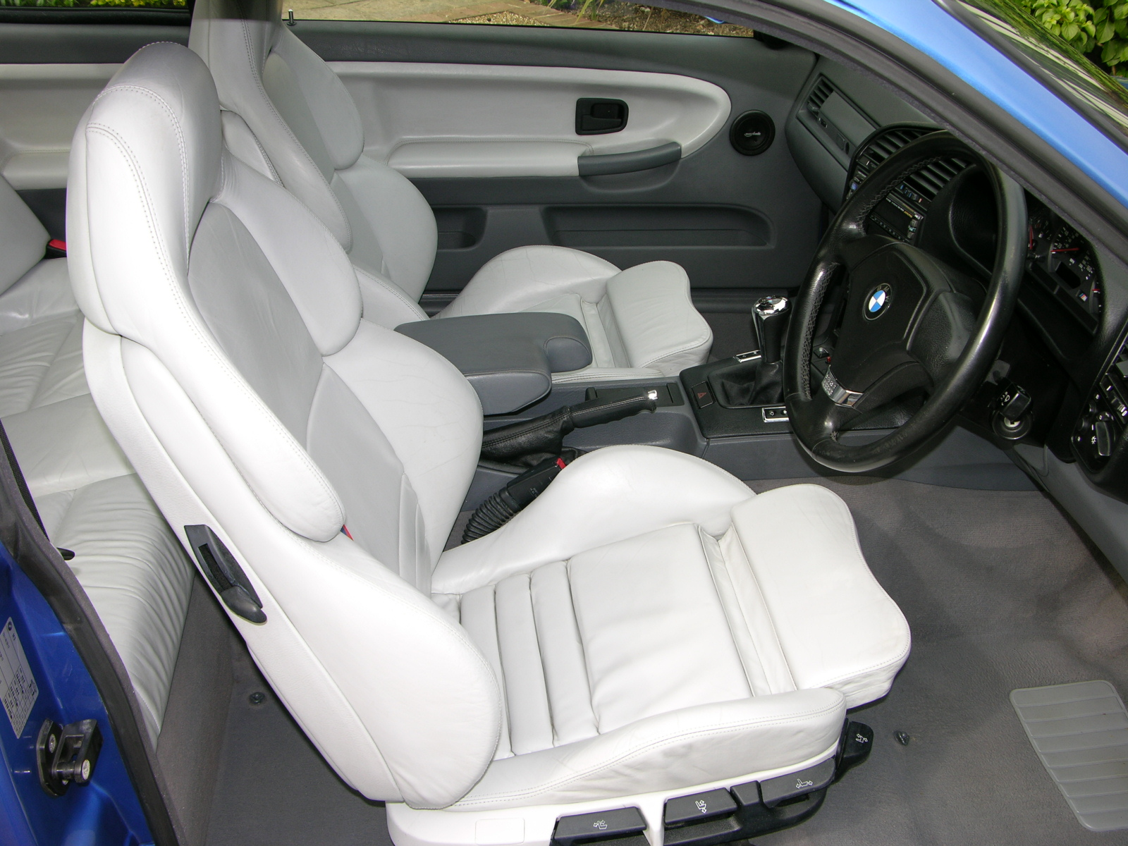 BMW M3 Evo Coupe E36